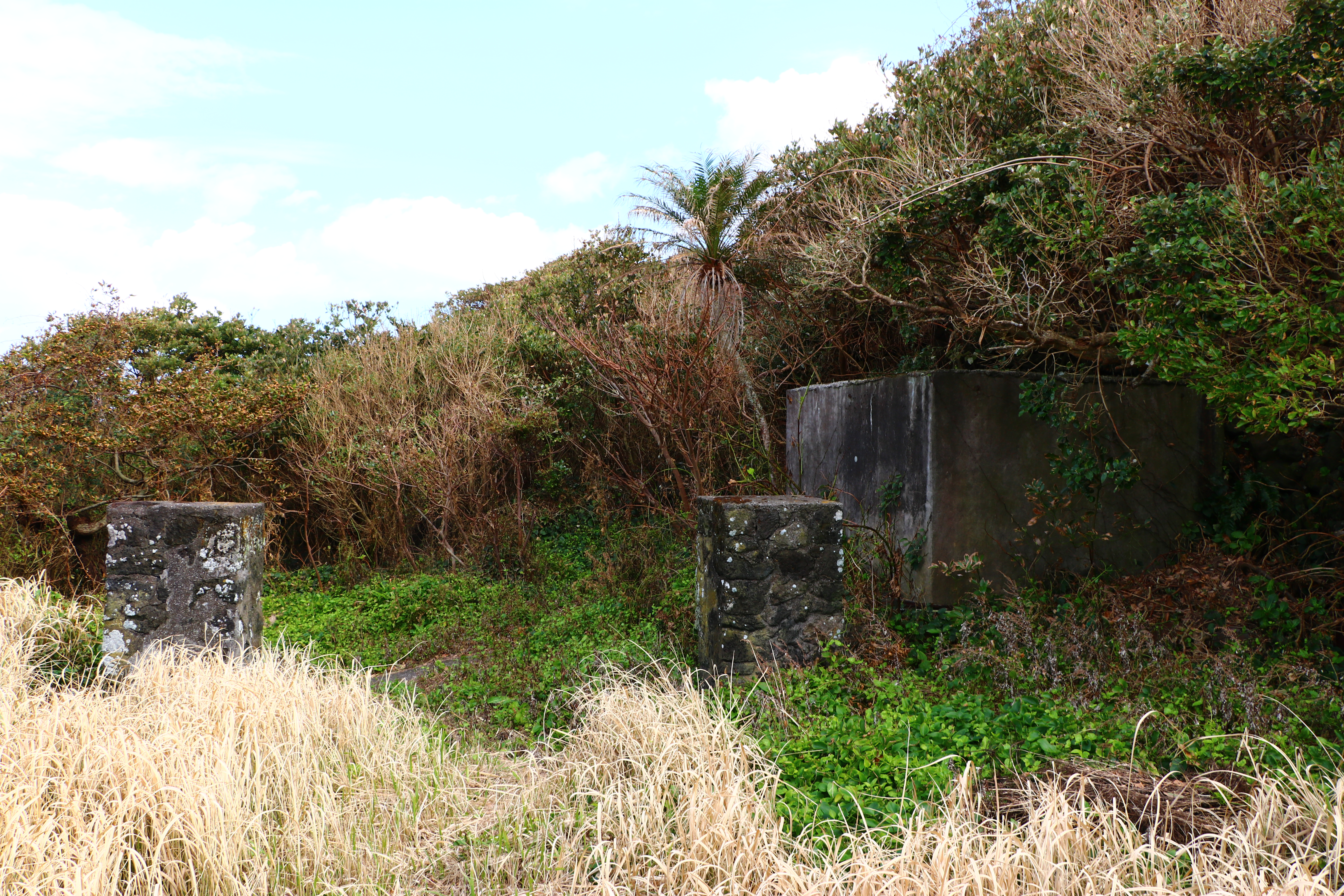 八丈小島の鳥打小中学校跡地（東京都八丈町）